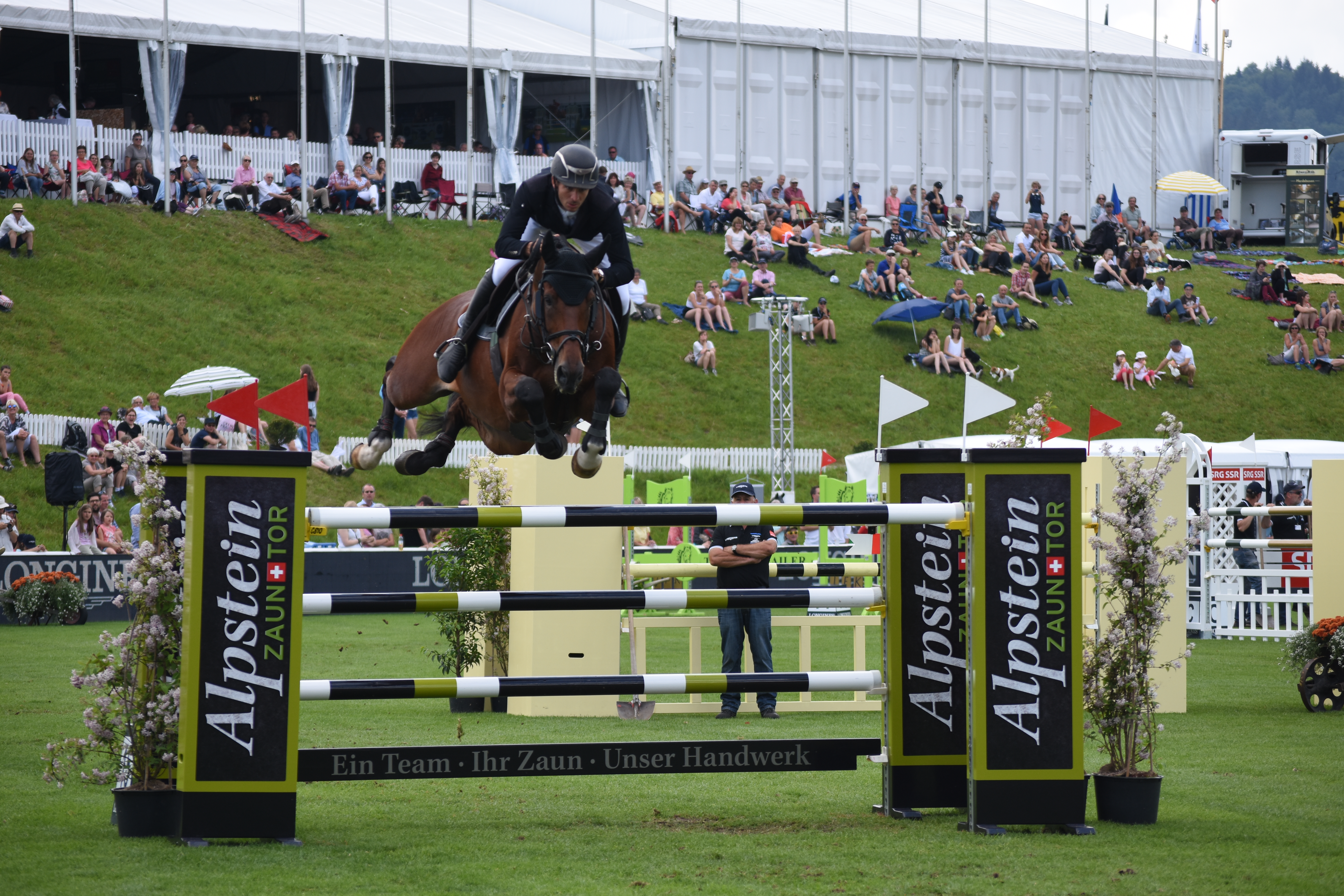 Steve Guerdat gewinnt den Preis der MS Direct AG auf Corbinian am CSIO St. Gallen 2018 mit zwei fehlerlosen Ritten